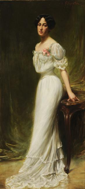 Γερανιώτης Δημήτριος, Προσωπογραφία της Ζαΐρας Θεοτόκη-Ράλλη